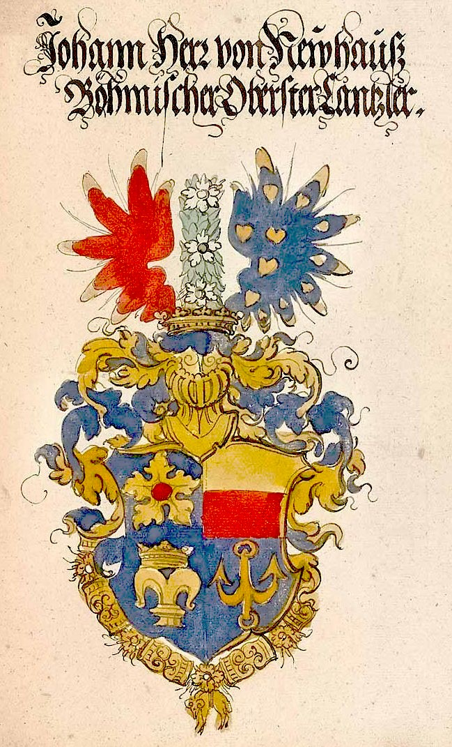 Wappen Johann von Newhauß (Neuhaus) aus einem unbekanntem Wappenbuch